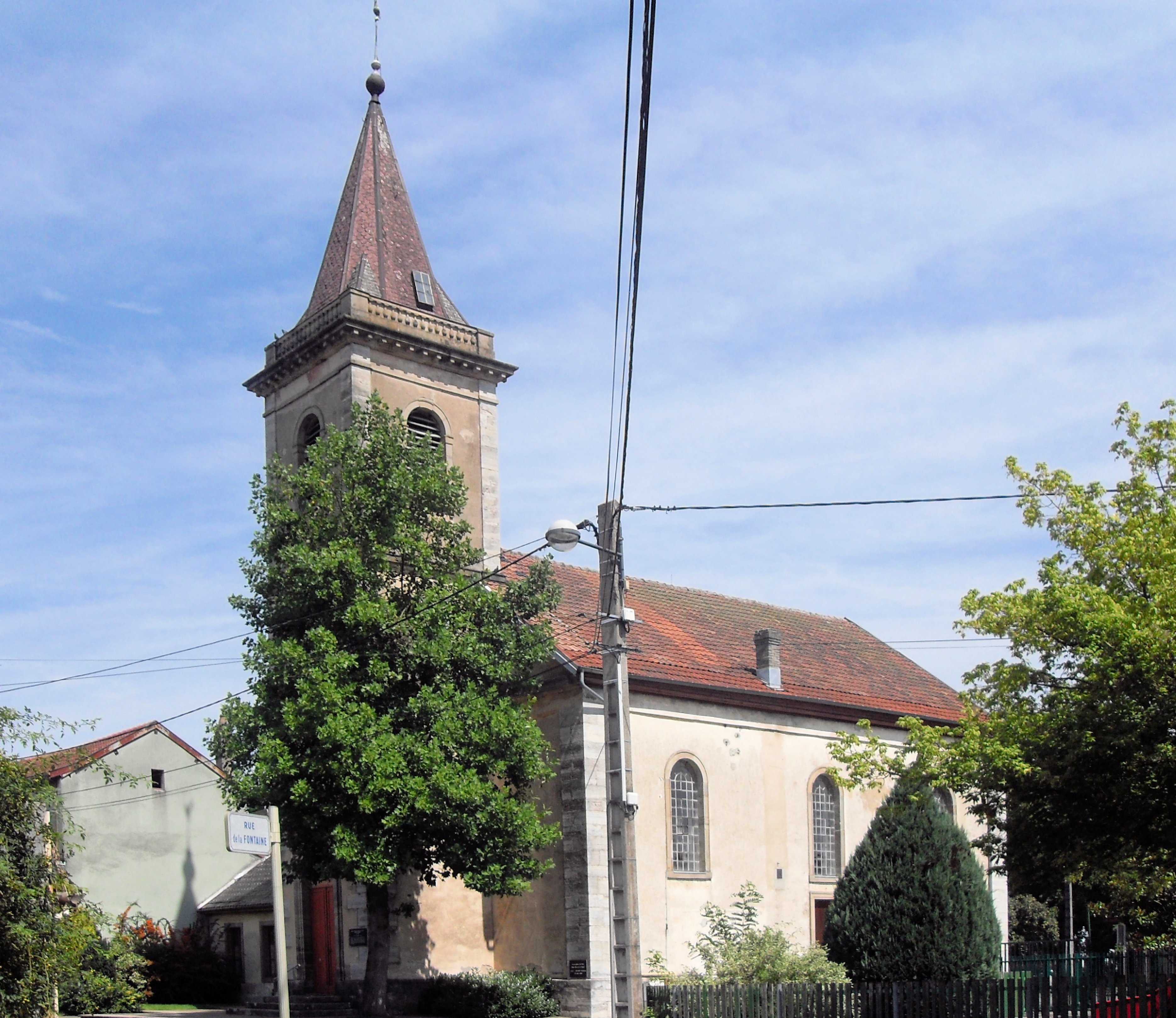 L'église évangélique luthérienne de Mandeure. La petite salle de culte de la rue Charles Goguel est jugée insuffisante en 1844. La commune confie le projet de construire un temple à l'architecte Frédéric Morel-Macler. Les travaux commencent en 1845 sur un terrain contigu au cimetière protestant. Il est inauguré le 15 octobre 1848 par le pasteur Charles Goguel. Endommagé à la libération, il est restauré, transformé et récouvert le 25 avril 1948.